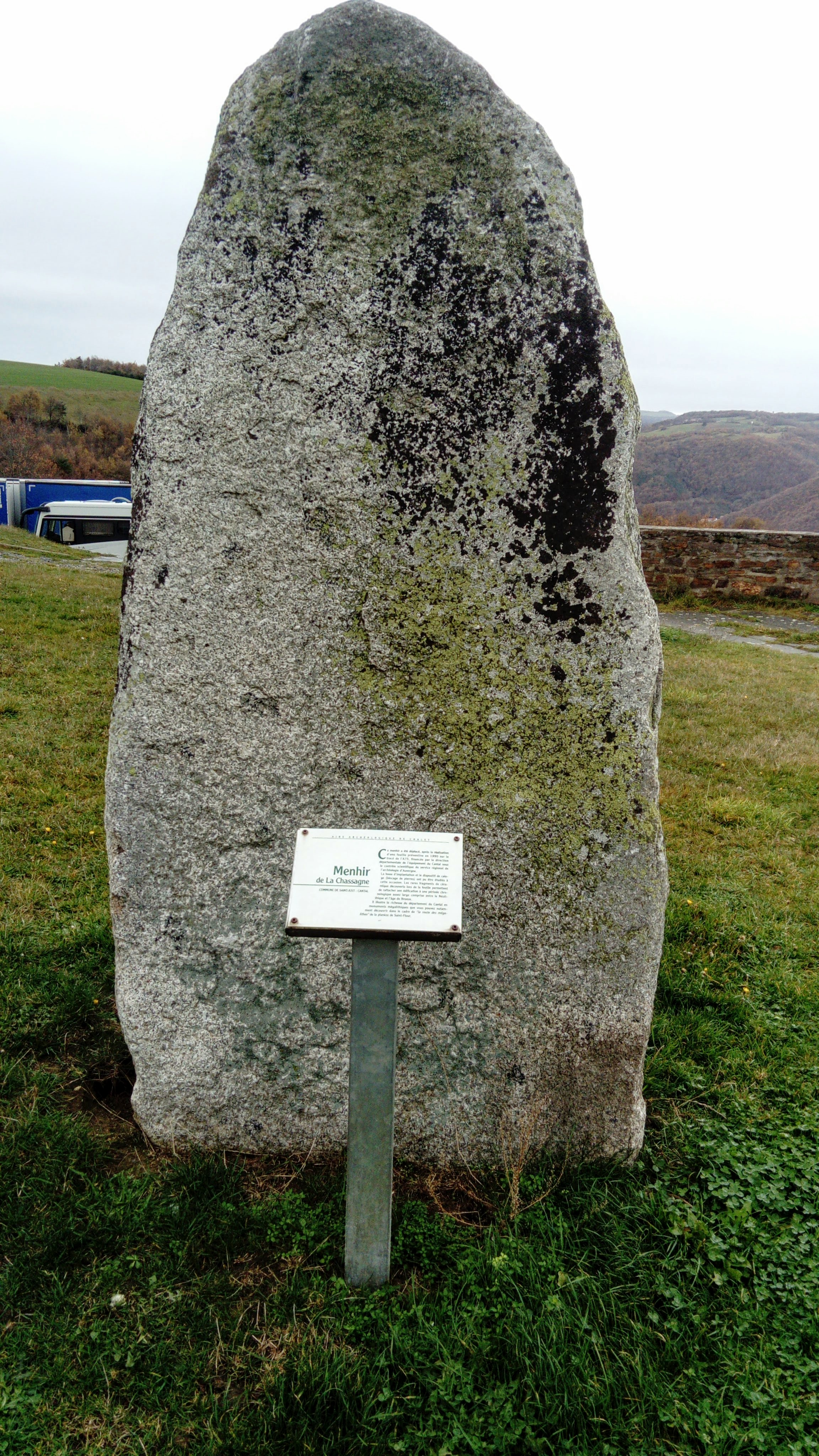 Menhir de la Chassagne sur l'aire de Chalet (autoroute A75)